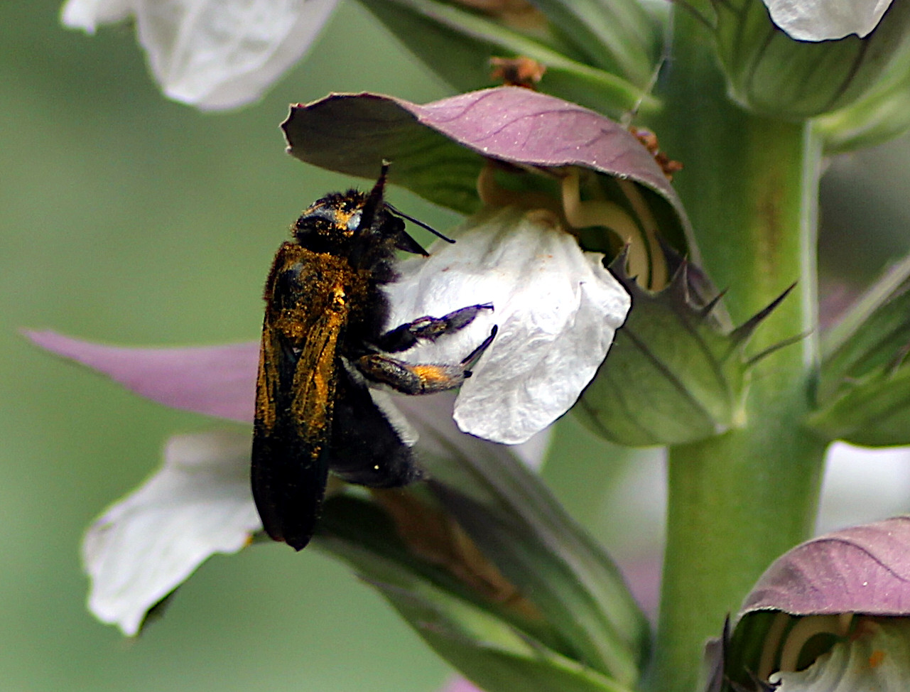 Xylocope violet sur une fleur d'Acanthus mollus